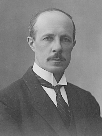 Konstantin Ramul